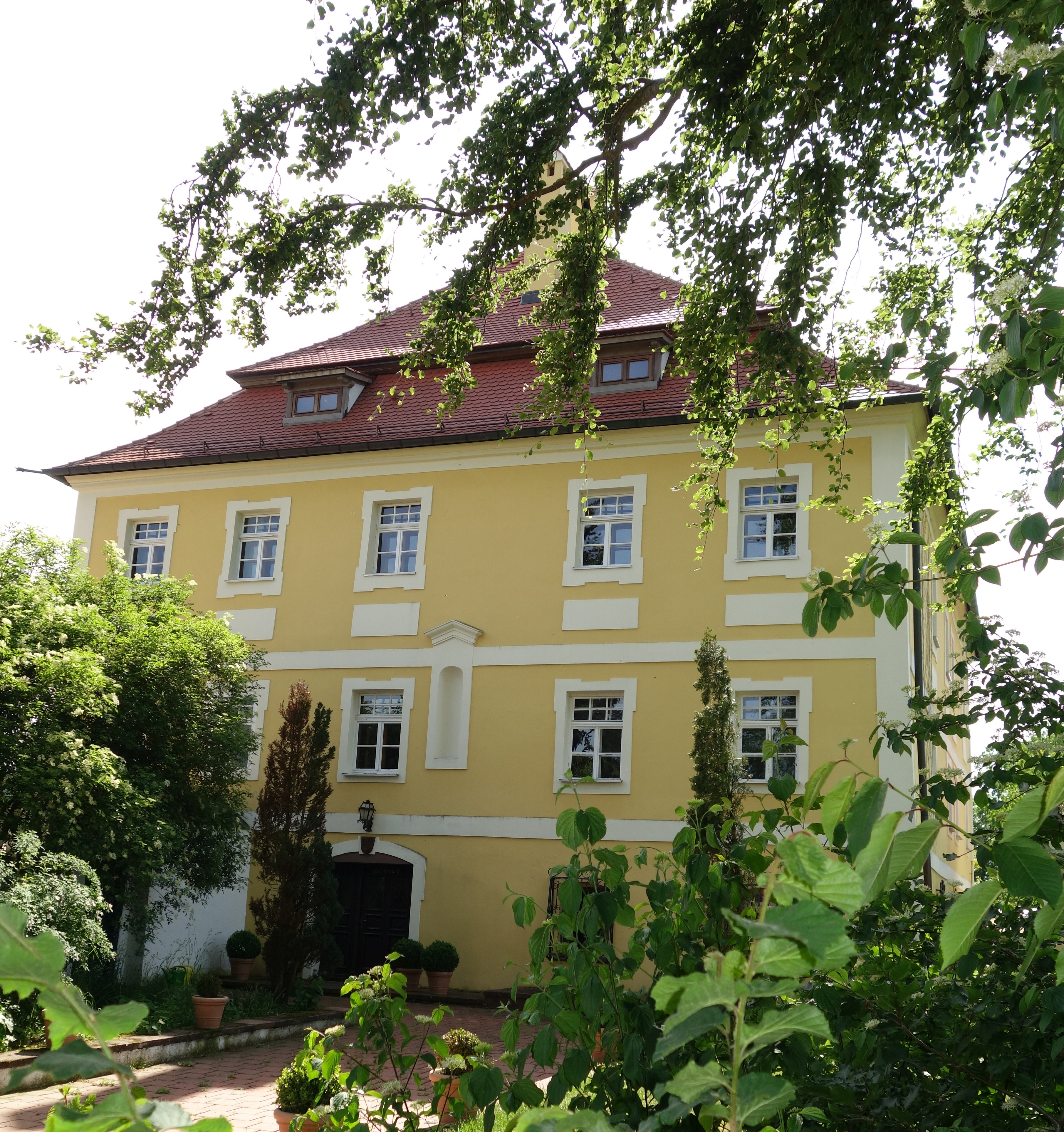 Schloss Herrnried - Gebäudefront mit Eingangsbereich